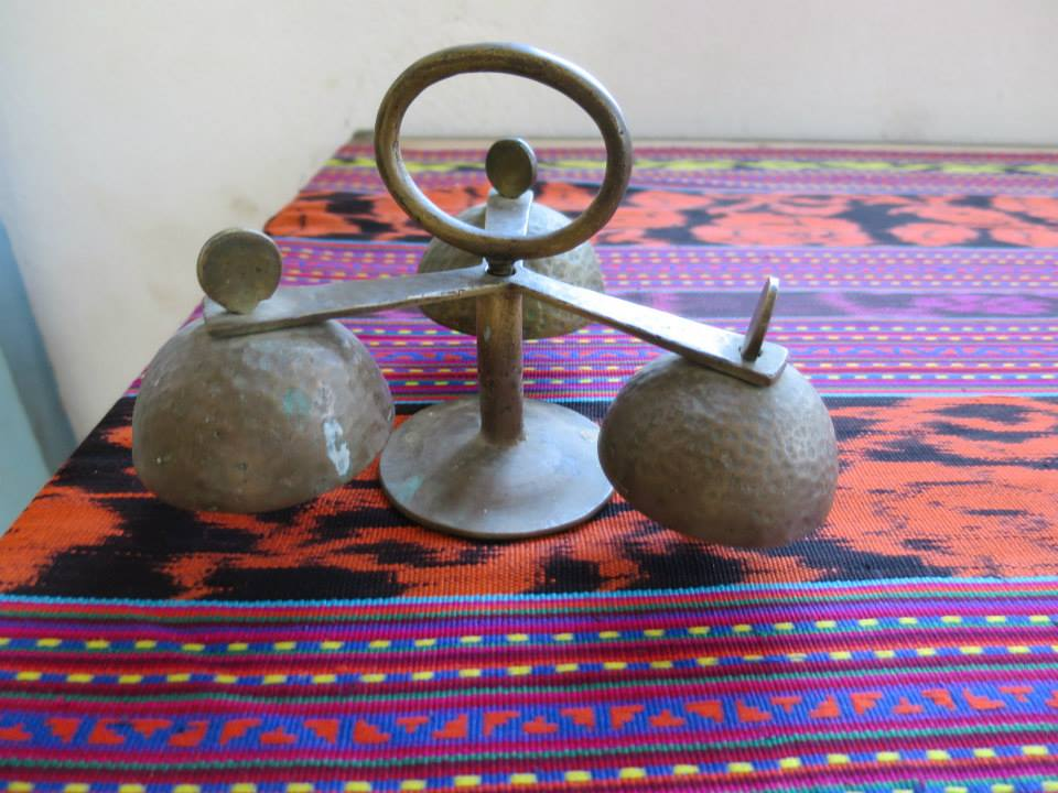 Igreja de Sao Tiago de Hera